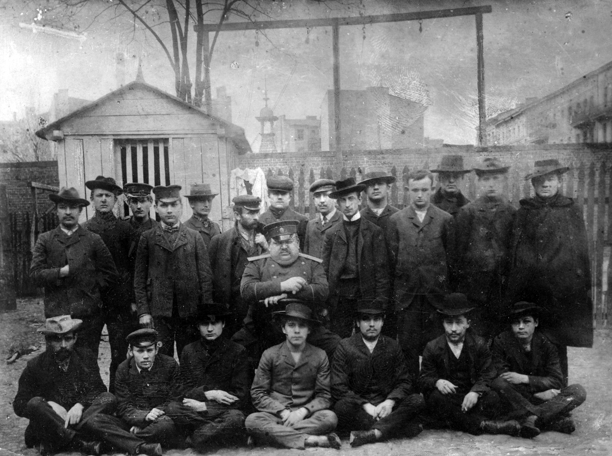 Przymusowa fotografia aresztowanych z więzienia przy ul. Długiej (Gdańskiej) w Łodzi. Po środku siedzi Naczelnik Modzelewski zwany "Grubym". Siedzą od lewej: Walczak – powieszony za zabójstwo prowokatorki, Machtałowicz – były członek SDKPiL. Brał udział w zamachu na komisarza policji Szatałowicza (akcję zorganizował Tomasz Arciszewski, przyszły premier RP na uchodźstwie w latach 1944–1947). Następnie stał się prowokatorem i pomocnikiem kata Ryszarda Fremla, Kałduński – członek organizacji bojowej SDKPiL, potem prowokator. Został powieszony przez własnego szwagra, Fremla, Nowak – członek milicji PPS powieszony za zabójstwo prowokatorki, Walczak (młodszy) – członek SDKPiL, powieszony za zabójstwo prowokatorki, M. Miller – członek Organizacji Bojowej PPS, zabójca prowokatora Augusta Fremla, byłego naczelnika bojowej organizacji SDKPiL – brata kata łódzkiego, Ryszarda, Edward Dłużewski – członek milicji PPS, „słynął z niesłychanej odwagi. W czasie aresztowania kładzie trupem rewirowego i dwóch strażników. Otrzymuje 10 lat ciężkiego więzienia (miał 15 lat życia). Ucieka z więzienia z Kalisza i tworzy samodzielną organizację Rewolucjonistów Mścicieli. Wyśledzony przez policję, osaczony w domu przy ul. Kilińskiego róg Pustej (Wigury) w dzień Wielkiej Nocy, barykaduje się. Nie mogąc go zdobyć żywcem, policja pali dom.” Stoją od lewej: Nauczyciel niewiadomego nazwiska, Kazimierz Galant – zgierski robotnik, członek Organizacji Bojowej PPS, uczestnik zamachu na pocztę w Zgierzu, skazany na 15 lat katorżniczych robót, Pierwszy od prawej: Ryszard Fremel - kat, były członek SDKPiL; „za darowanie mu winy z błahego przestępstwa (zesłanie w głąb Rosji) podejmuje się roli kata. Powiesił przeszło stu ludzi w tym własnego szwagra (Kałduńskiego).” Trzeci z prawej: Hipolit Pośrednicki – były członek SDKPiL, później prowokator i pomocnik kata. Zesłany w głąb Rosji; po wybuchu rewolucji październikowej został zdemaskowany i rozstrzelany przez bolszewików.